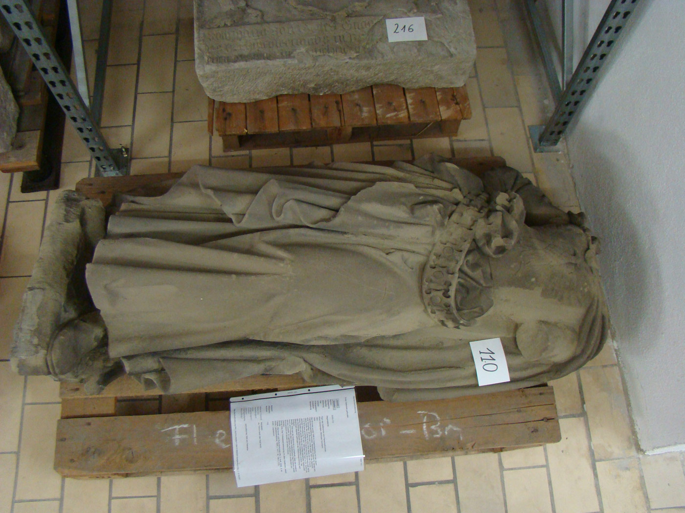 Überreste der Heilbronnia-Statue des Fleinertorbrunnens im Heilbronner Lapidarium